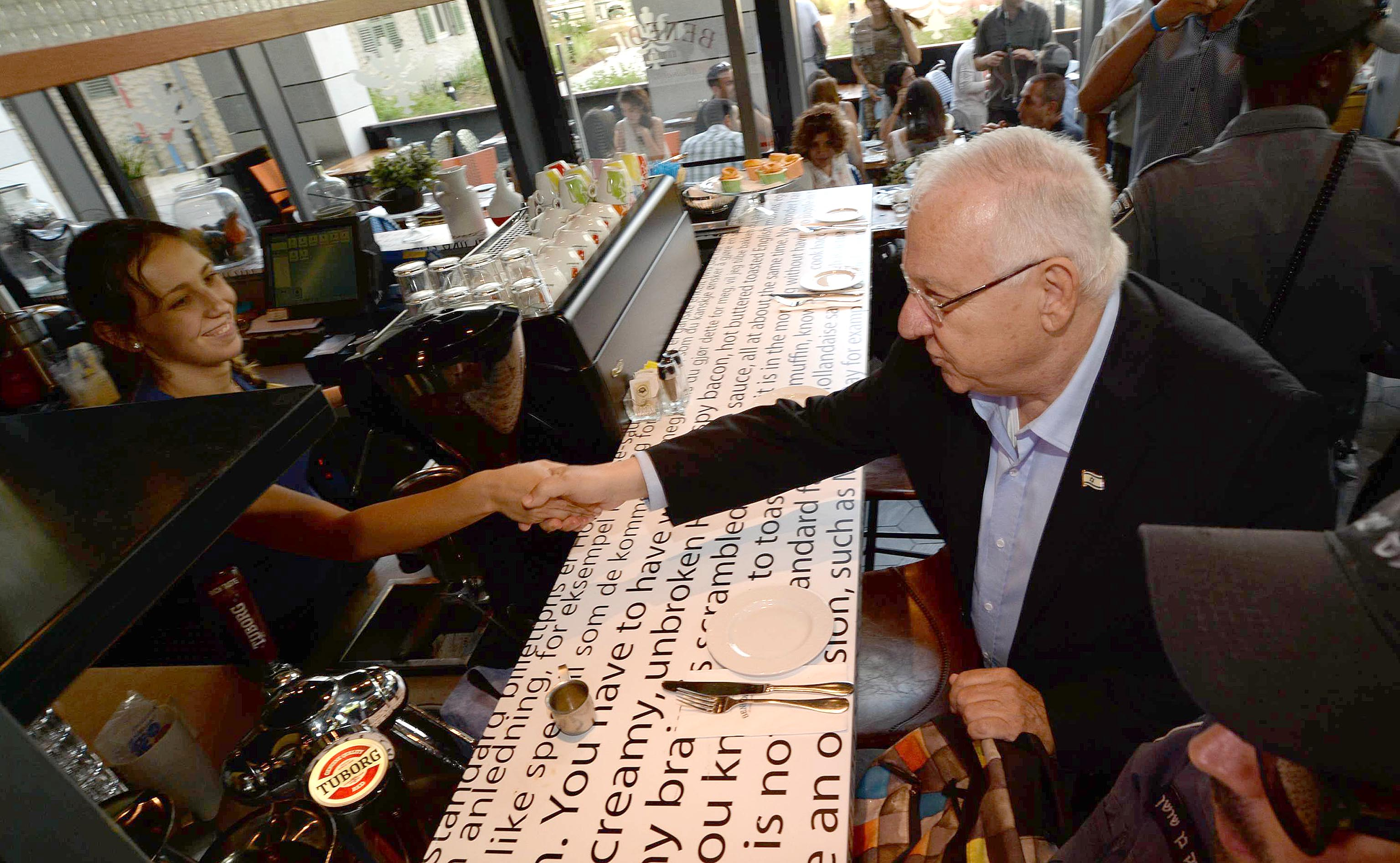 נשיא מדינת ישראל ראובן ריבלין בביקור במסעדת בנדיקט בשרונה מרקט יום לאחר מתקפת הטרור במתחם שרונה שהתרחש ב-8 ביוני 2016